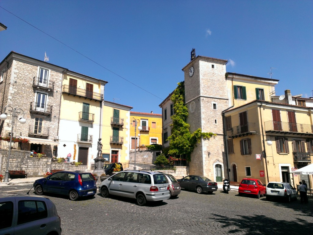 Piazza del Municipio This is a photo of a monument which is part of cultural heritage of Italy.